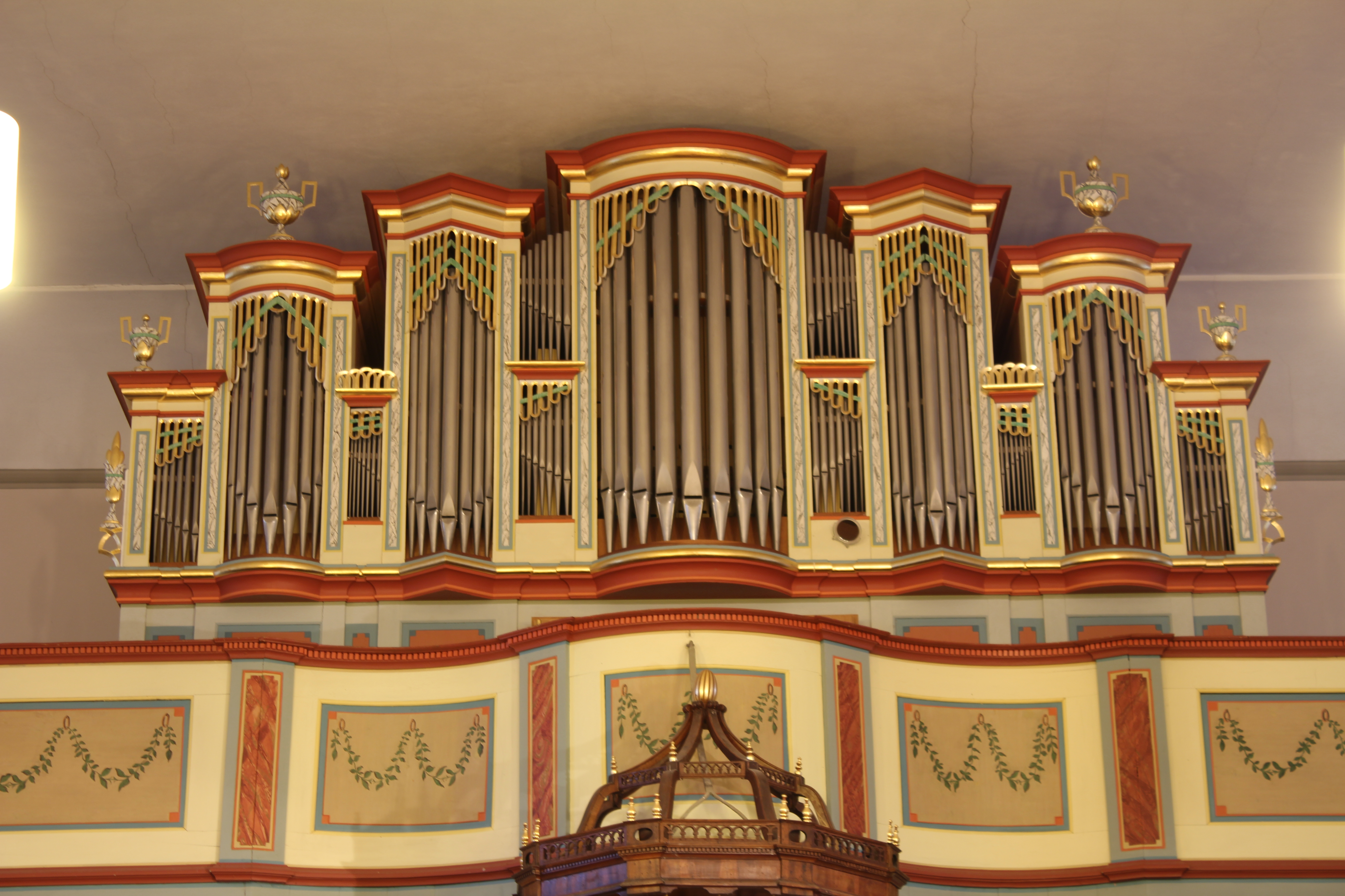 Evangelische Kirche Ober-Ohmen, Mücke, Vogelsbergkreis, Hessen, Deutschland